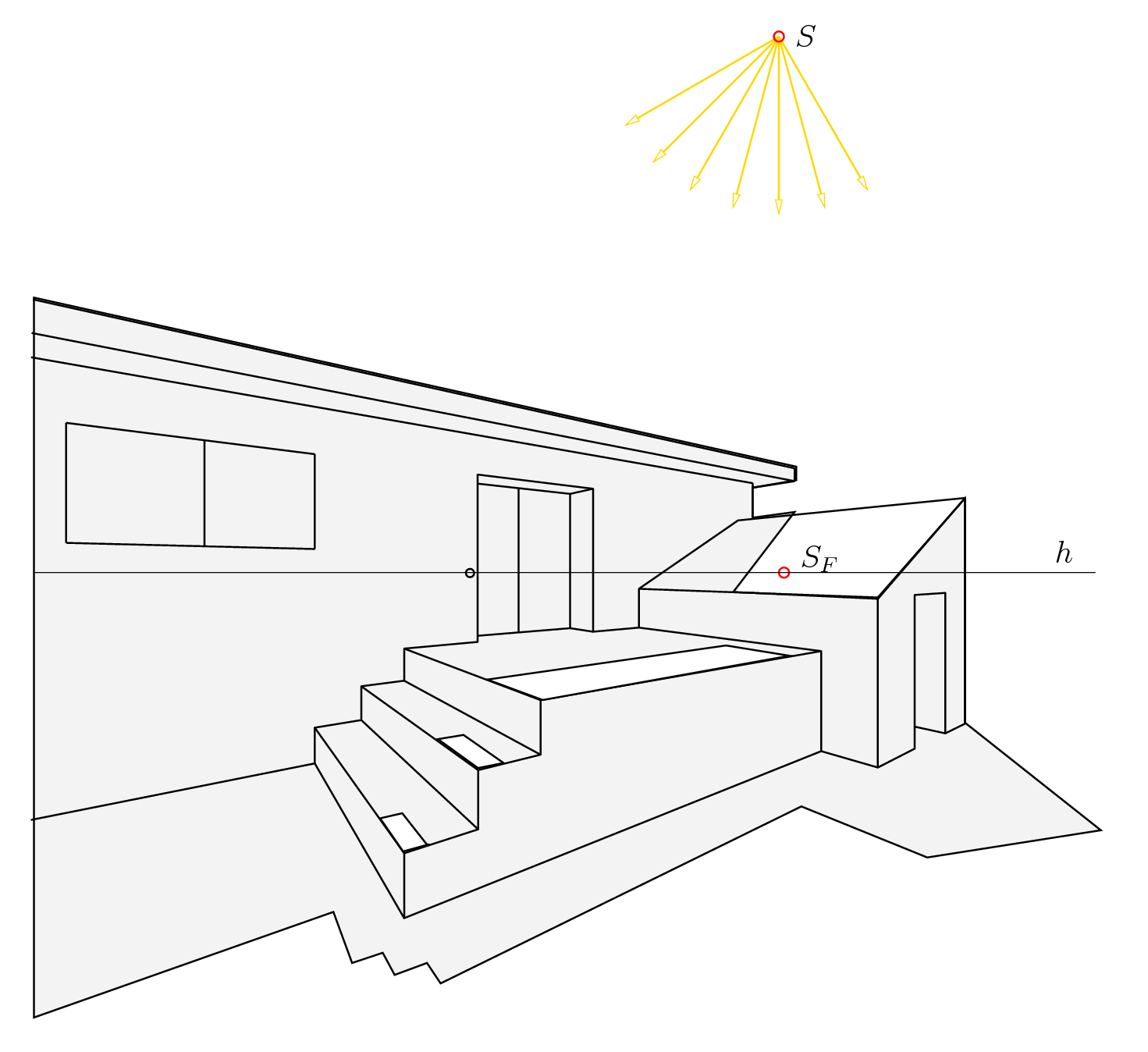 Zentralprojektion: Lagerhalle mit Schatten bei parallelem Licht